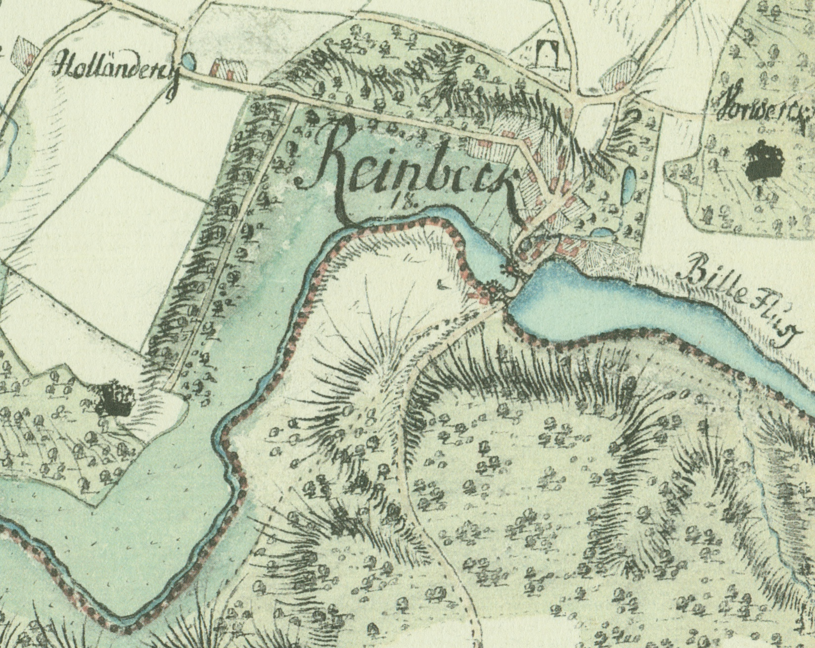 Varendorfsche Karte 63 (Ausschnitt Reinbek) Topographisch-militärische Charte des Herzogtums Holstein. Aufgenommen in den Jahren von 1789 bis 1796 unter Leitung des Majors Gustav Adolf von Varendorf durch Offiziere des Schleswigschen Infanterieregimentes.